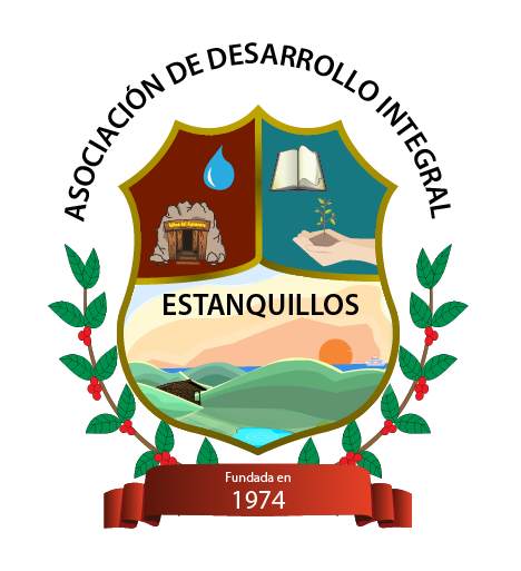 Escudo de la Asociación de Desarrollo Integral de Estanquillos